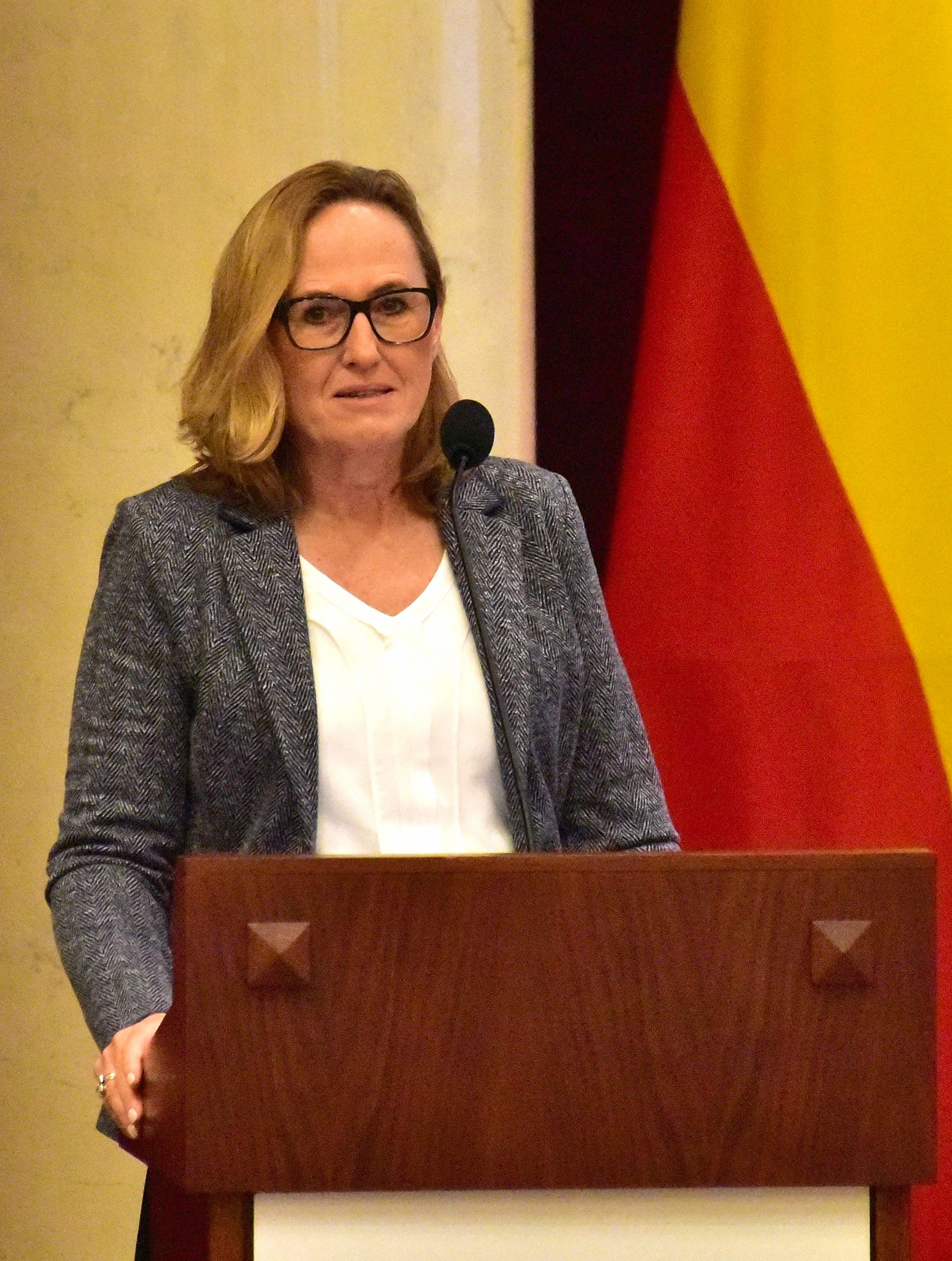 Ewa Malinowska-Grupińska, przewodnicząca Rady m.st. Warszawy, podczas III sesji Rady m.st. Warszawy